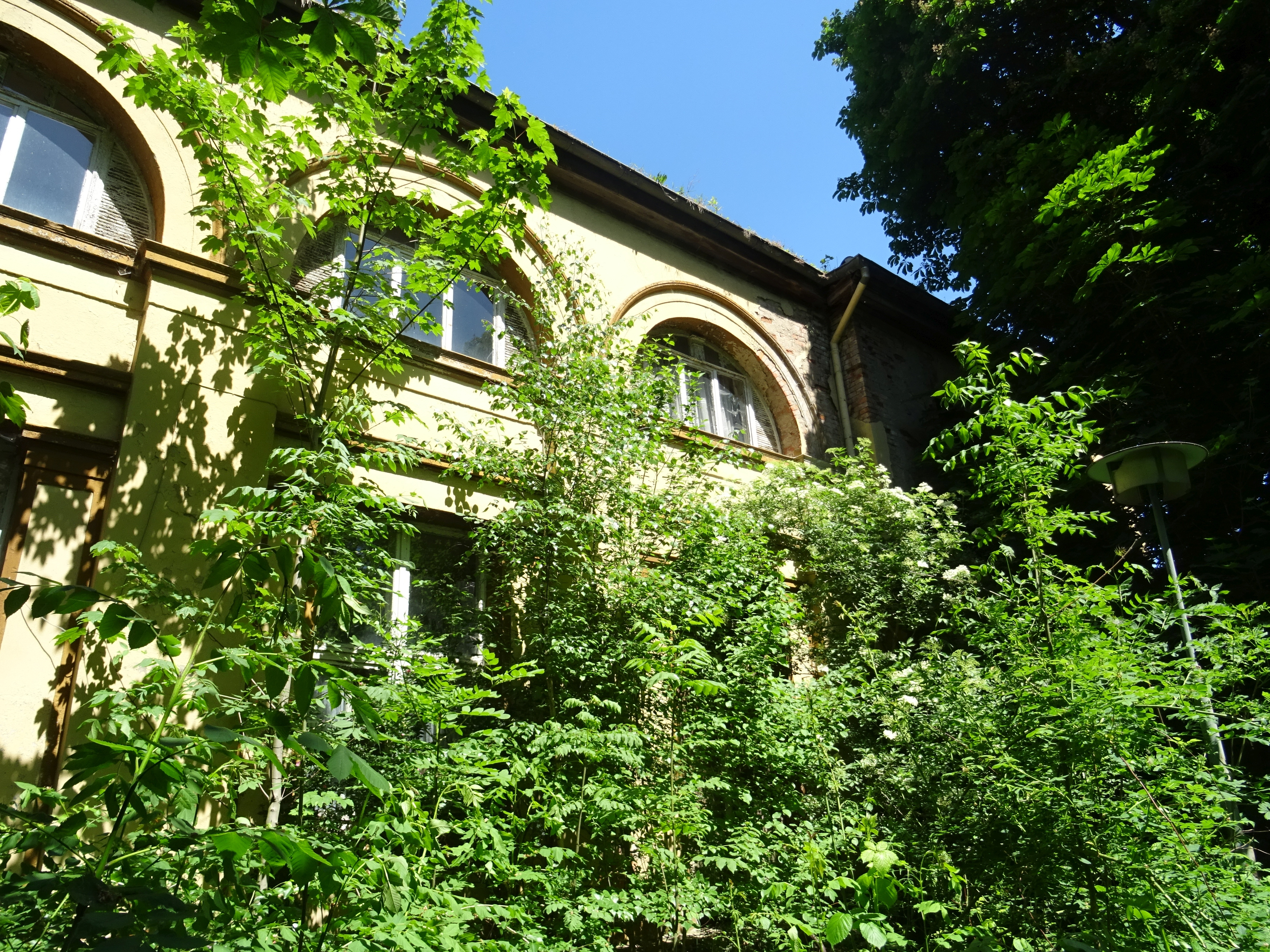 Bahnhof Neuwegersleben, Bahnsteigseite